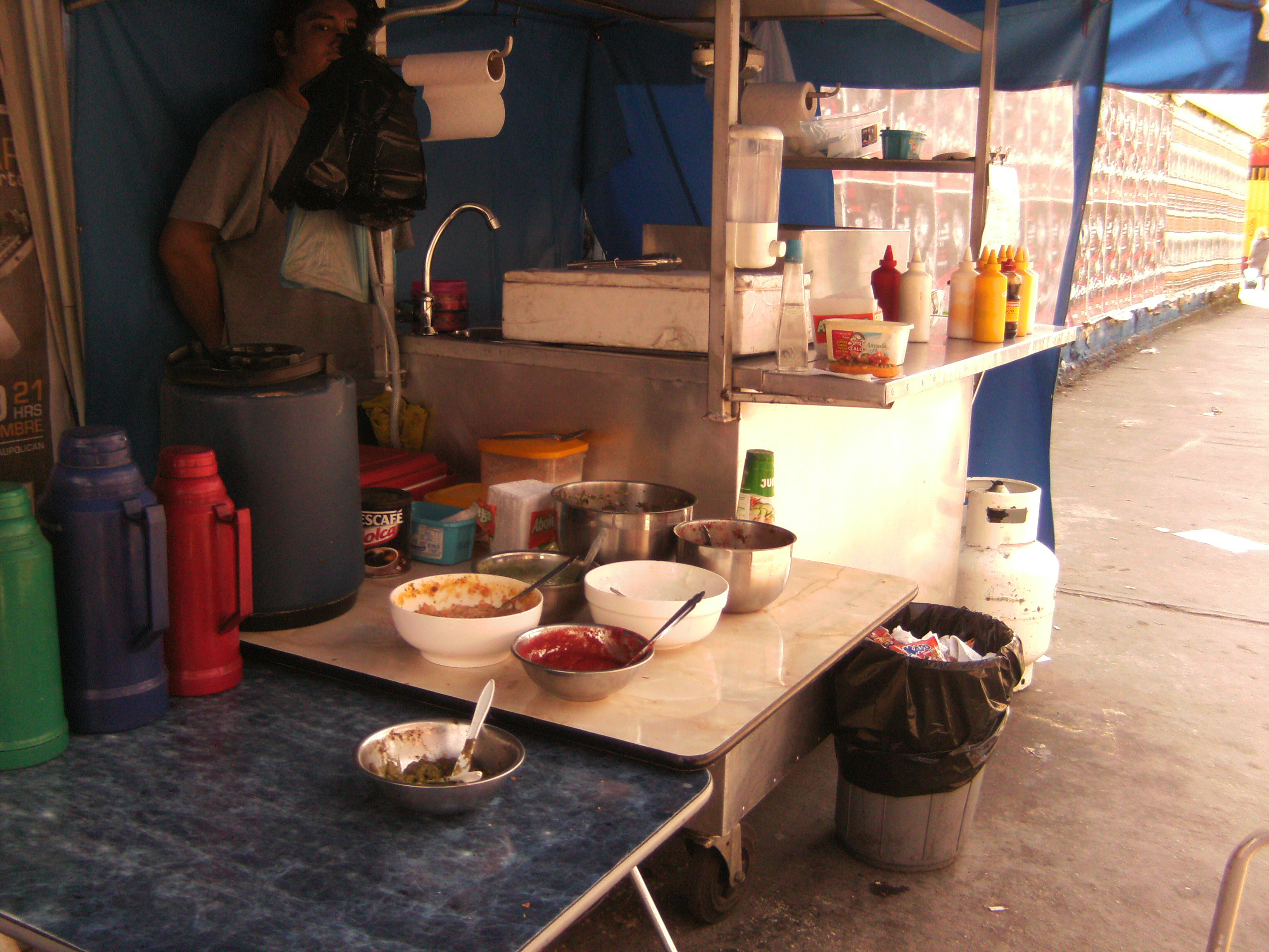 Sopaipilla de carro en Barrio universitario de San Joaquín en Santiago de Chile. La competencia ha llevado a multiplicar los aderezos.